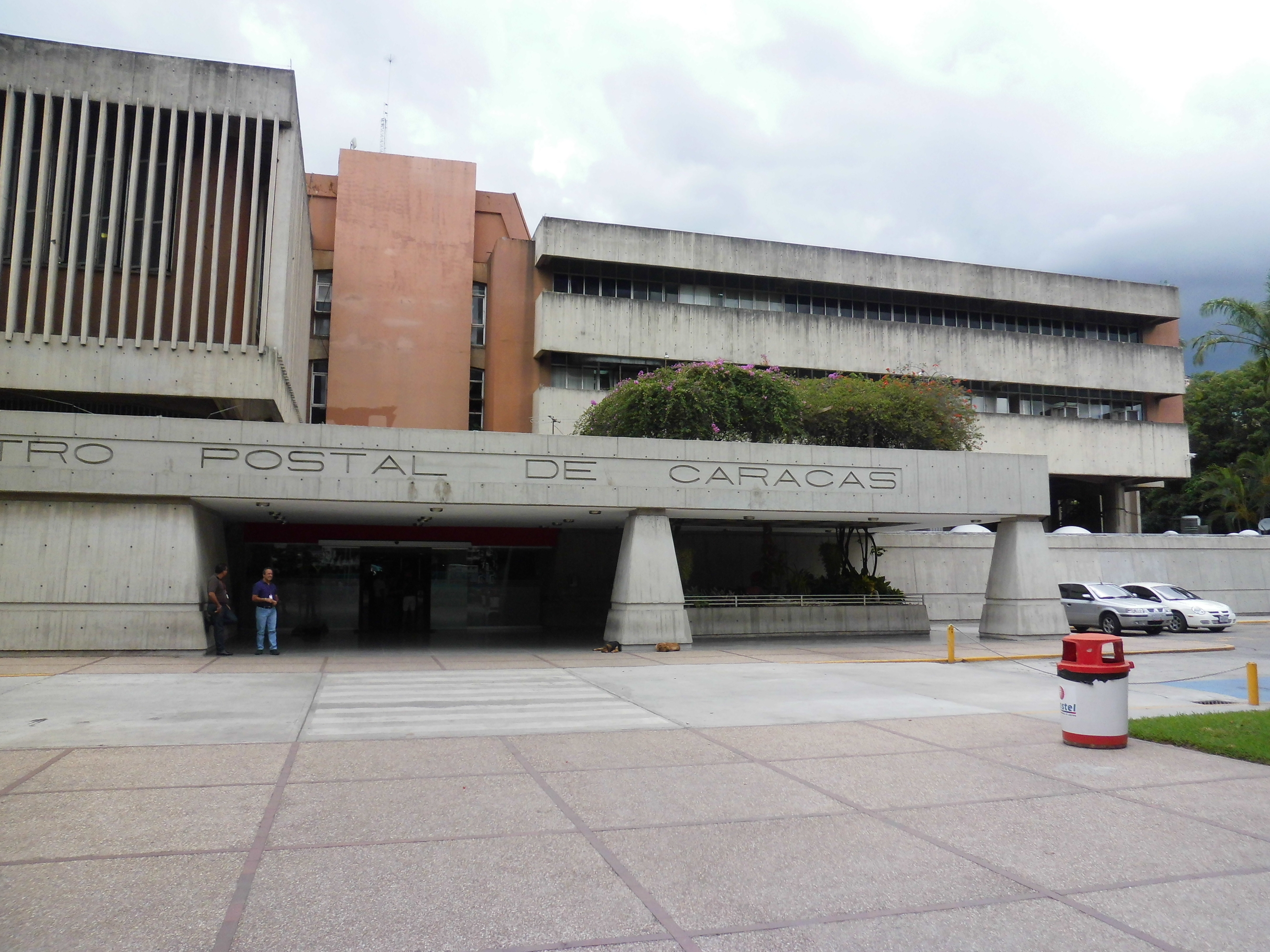 Centro Postal de Caracas avenida José Ángel Lamas, parroquia San Juan, Distrito Capital - Venezuela